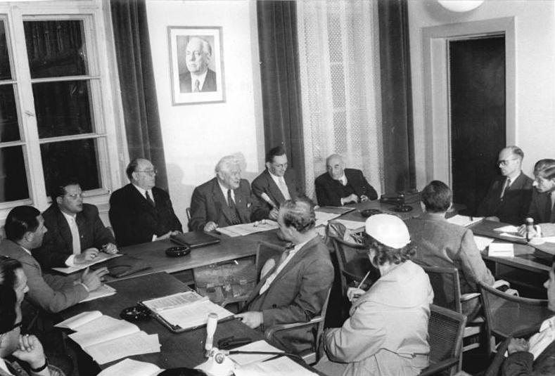 Zentralbild-Hesse/13.9.1956 Pressekonferenz in der Volkskammer Am 13. September 1956 fand im Gebäude der Volkskammer eine Pressekonferenz des Haushalts-, Finanz- und Rechtsausschusses über die Entwürfe zu den Gesetzen über die Rechte und Pflichten der Volkskammer gegenüber den örtlichen Volksvertretungen und über die örtlichen Organe der Staatsmacht statt. UBz: (Von links): Abgeordneter Kalmring, Abgeordneter Lühr, Max Seidewitz, Vorsitzender des Haushalts- und Finanzausschusses, Abgeordneter Dallmann, Vorsitzender des Rechtsausschusses, und Abgeordneter Professor Klemperer.